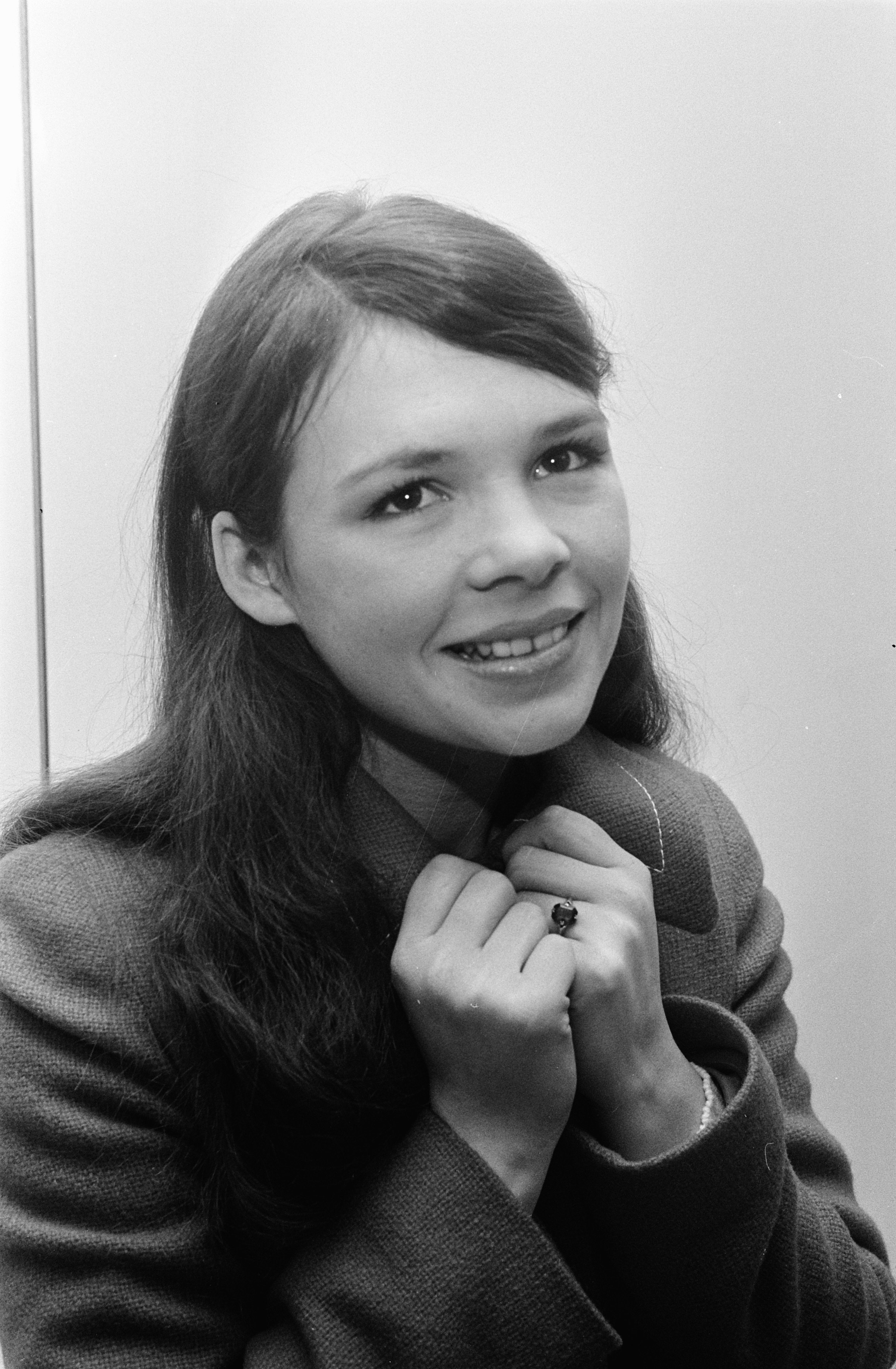 Collectie / Archief : Fotocollectie Anefo Reportage / Serie : Eurovisie Songfestival 1970 in RAI te Amsterdam Beschrijving : Ierse zangeres Dana arriveert op Schiphol voor Eurovisie Song Festival . Dana Datum : 16 maart 1970 Locatie : Noord-Holland, Schiphol Trefwoorden : zangers Persoonsnaam : Dana Instellingsnaam : Eurovisie Songfestival Fotograaf : Koch, Eric / Anefo Auteursrechthebbende : Nationaal Archief Materiaalsoort : Negatief (zwart/wit) Nummer archiefinventaris : bekijk toegang 2.24.01.05 Bestanddeelnummer : 923-3512